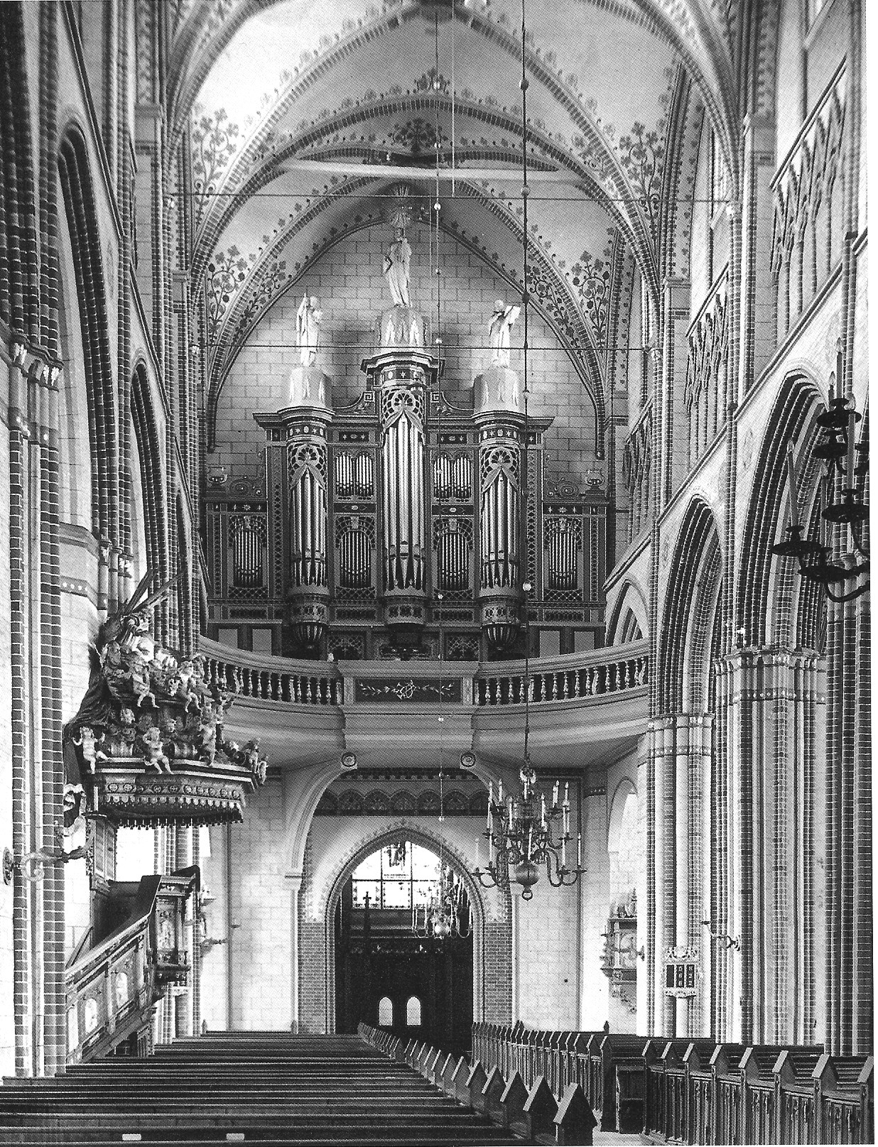 Orgel von St. Jakobi, Rostock